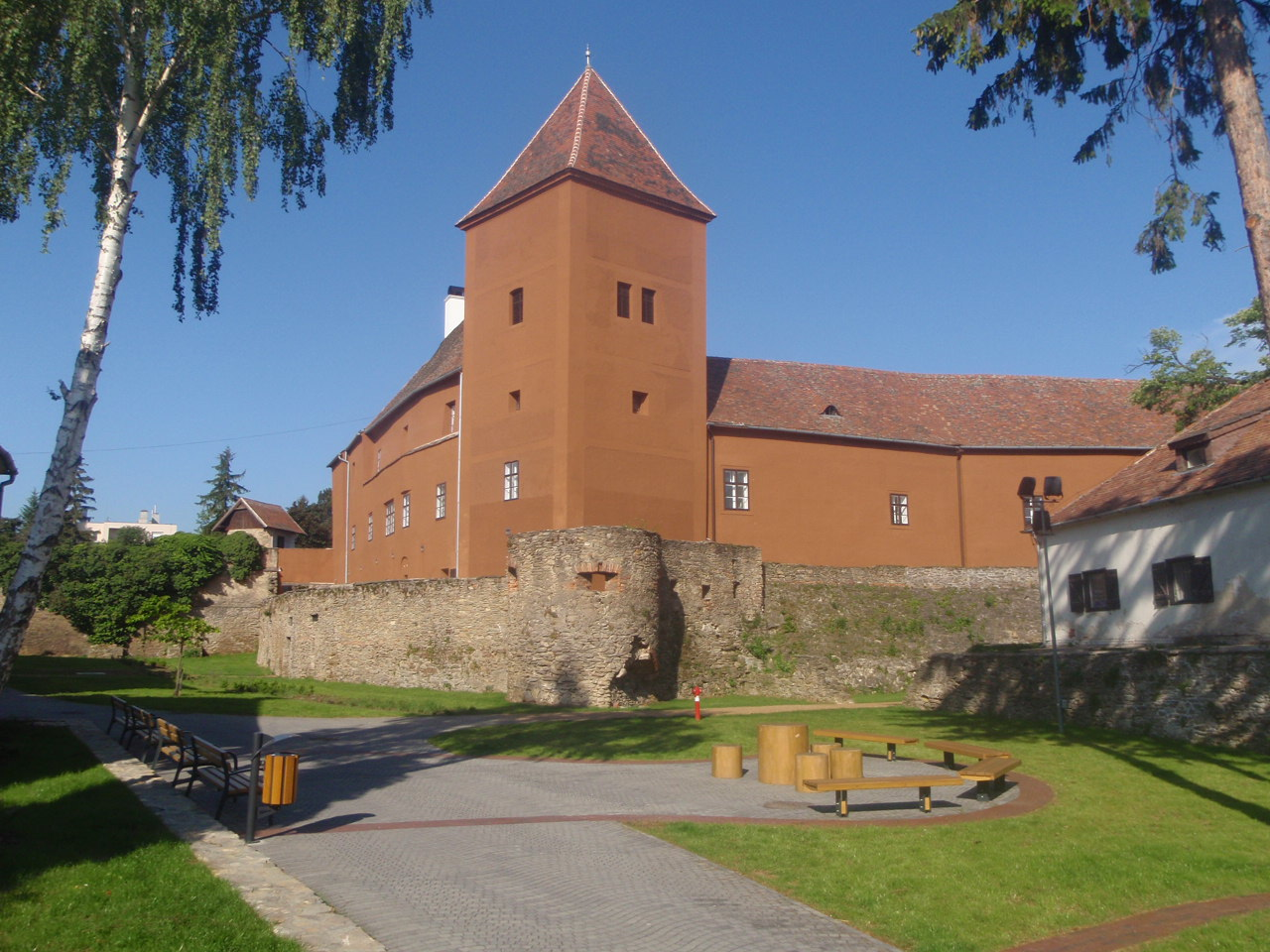 Kőszeg, kilátás a várra a Diáksétányról